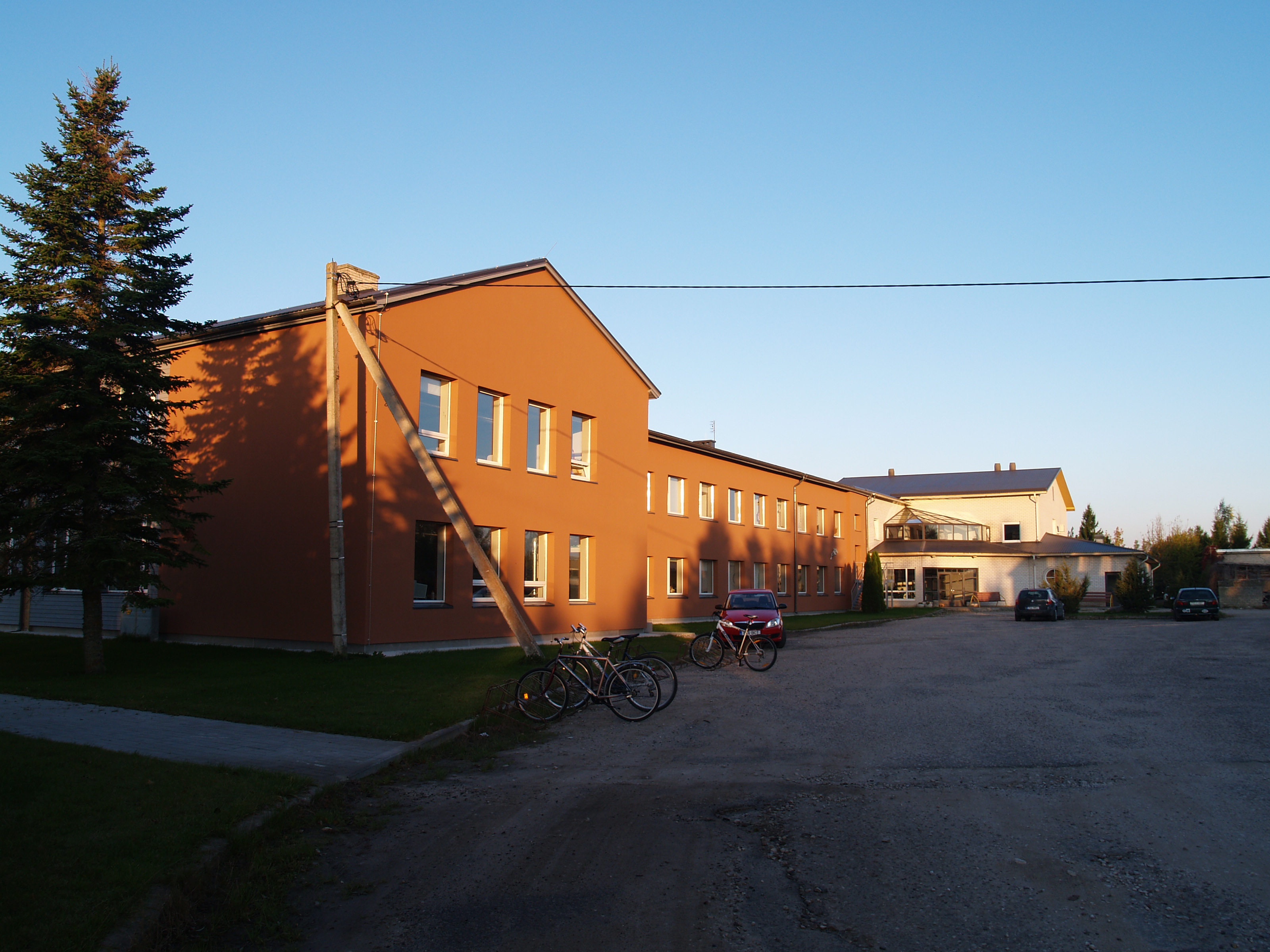 Käina Gümnaasium